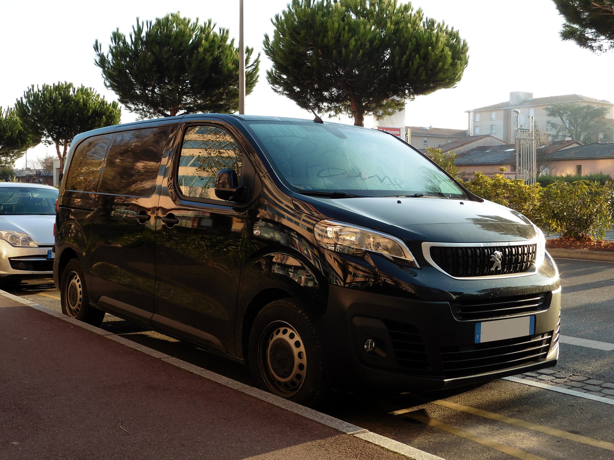 2016 Peugeot Expert.